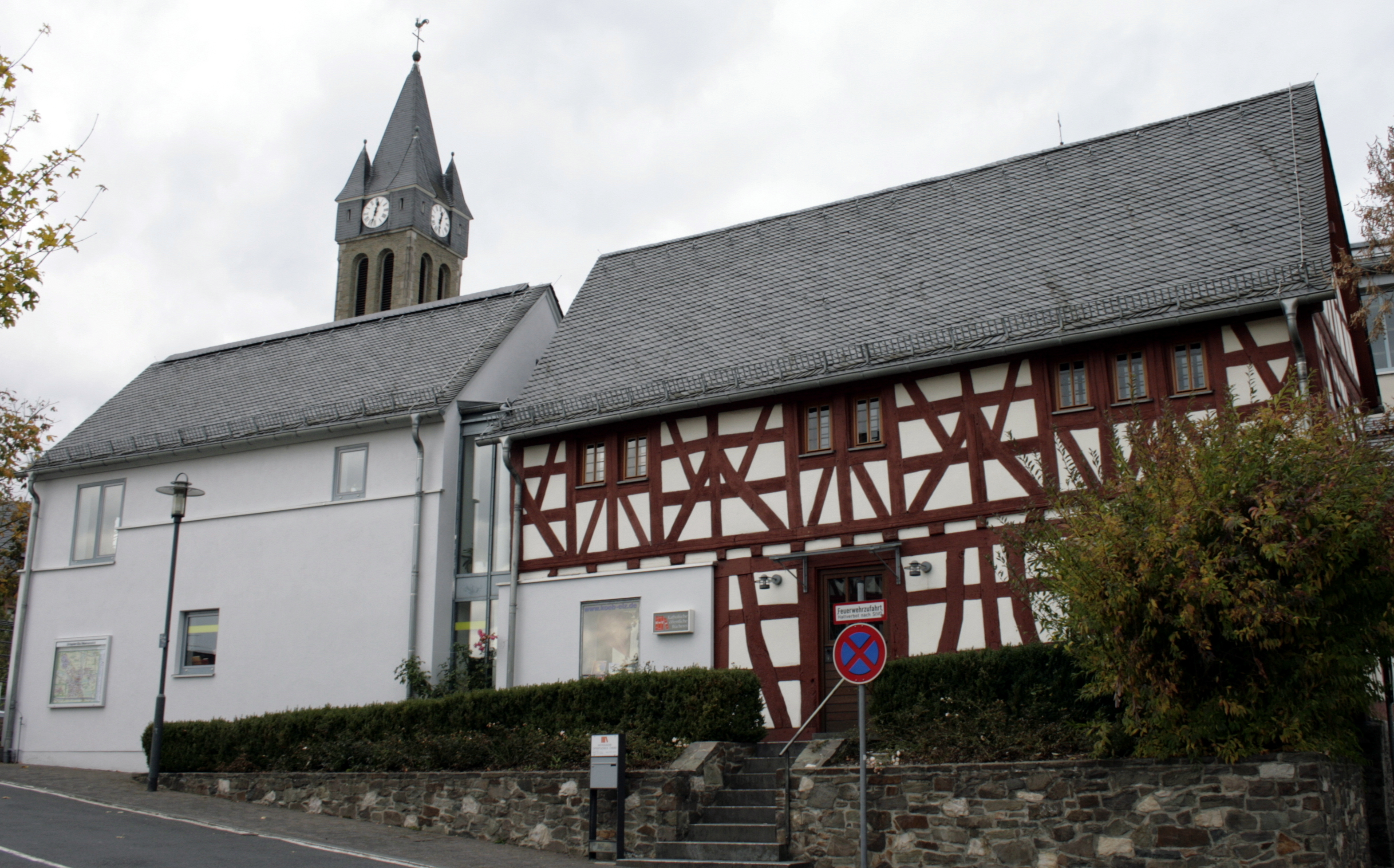 Stricksine Haus, Bücherei, in Elz, Deutschland